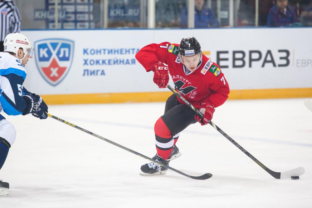 Нападающий новокузнецкого «Металлурга» Кирилл Капризов во время матча чемпионата КХЛ против минского «Динамо» 19 октября 2015 года.